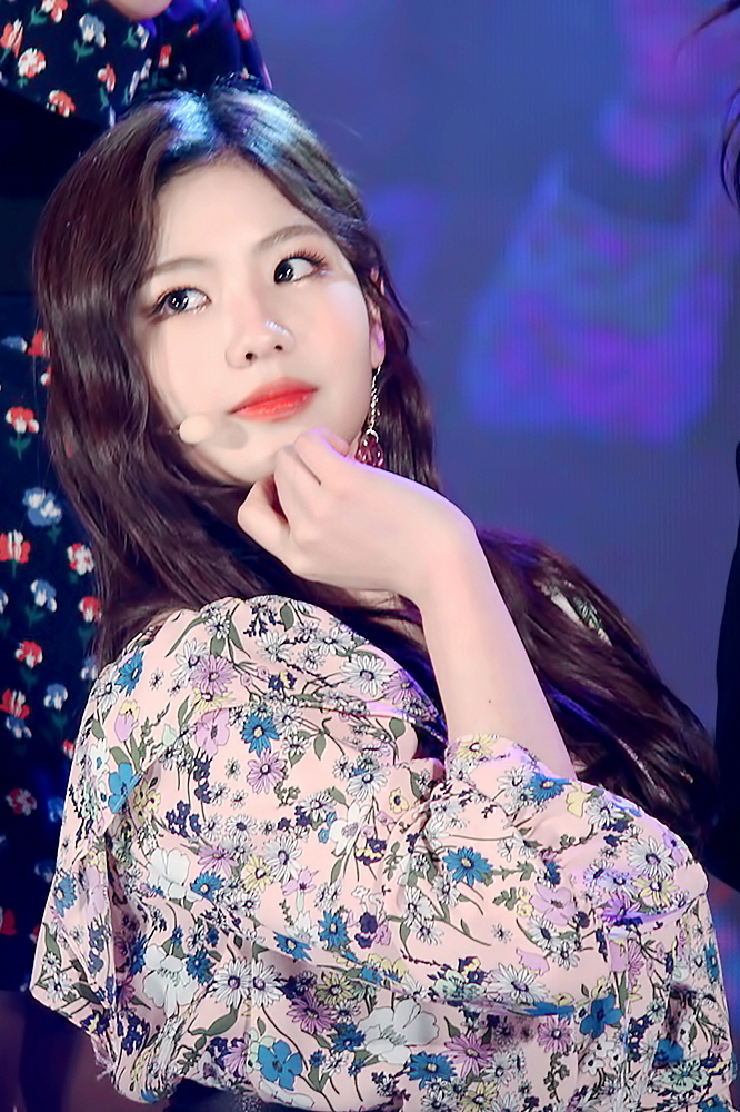 170526 안산 근로자 뮤직페스티벌 구구단 직찍